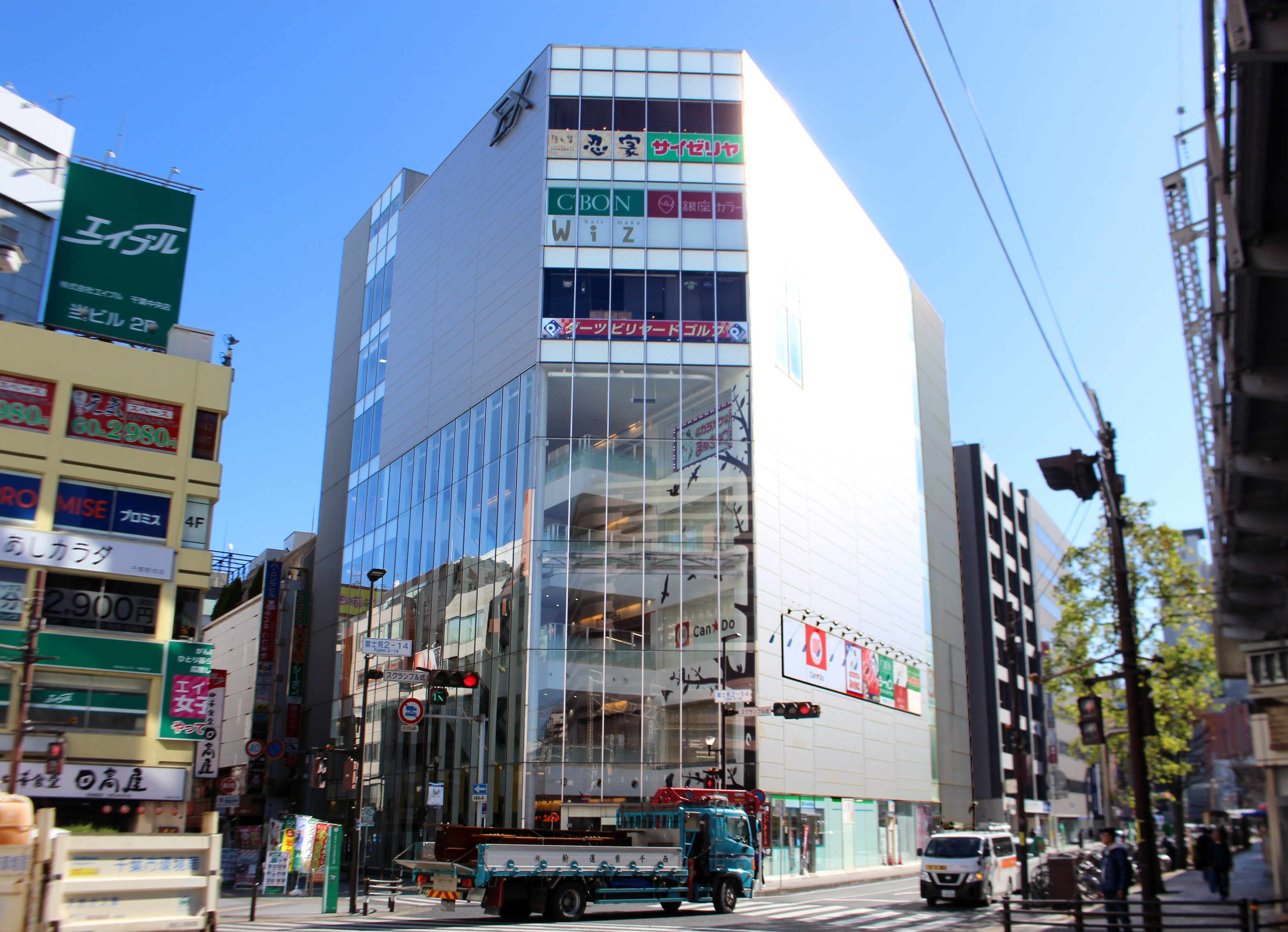 千葉EXビル（THE PRIME）